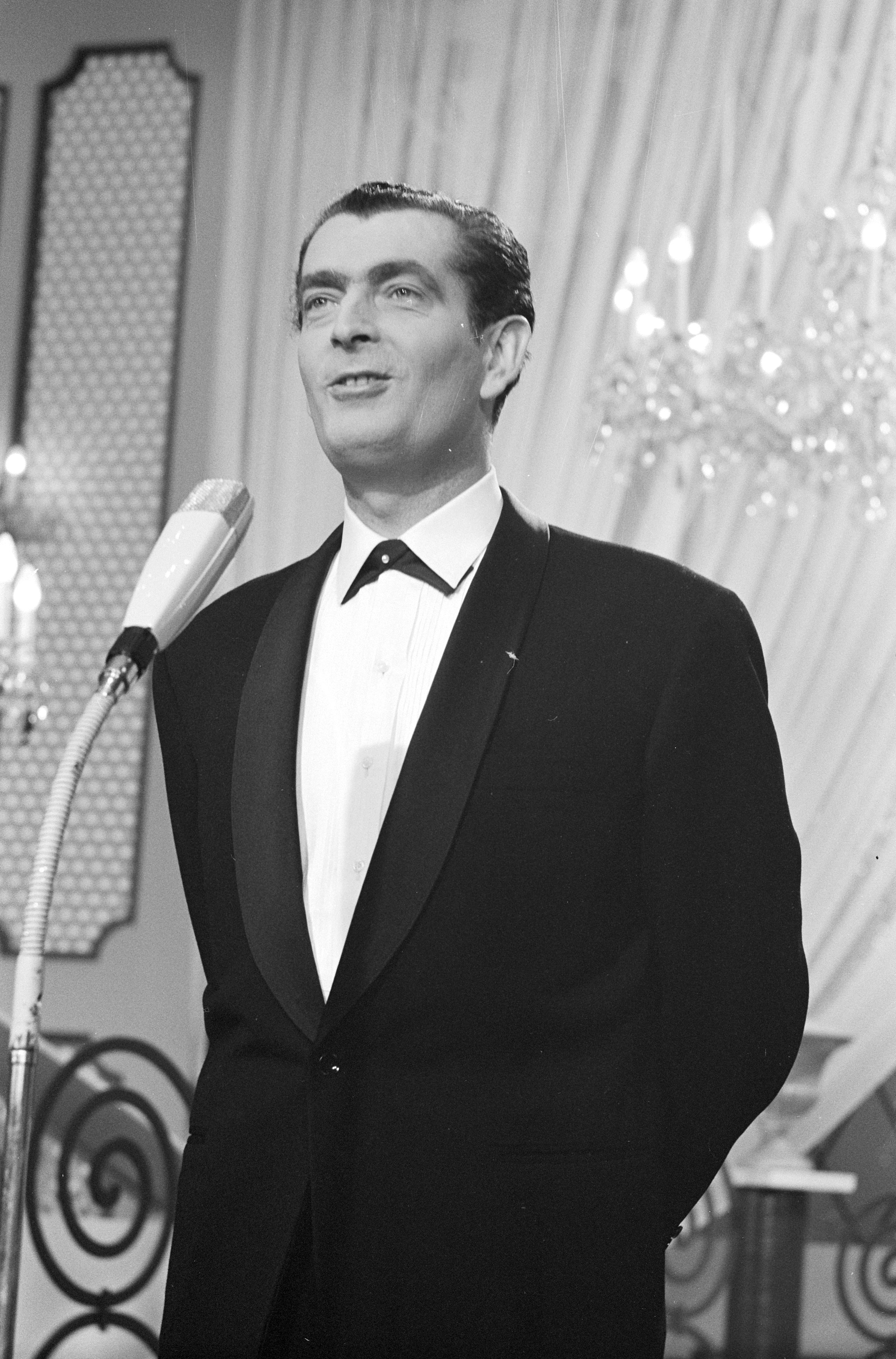 Collectie / Archief : Fotocollectie Anefo Reportage / Serie : [ onbekend ] Beschrijving : Eurovisie Songfestival 1962 te Luxemburg, voor Luxemburg Camillo Felgen Datum : 18 maart 1962 Locatie : Luxemburg Trefwoorden : artiesten, songfestivals Persoonsnaam : Felgen Camillo Fotograaf : Pot, Harry / Anefo Auteursrechthebbende : Nationaal Archief Materiaalsoort : Negatief (zwart/wit) Nummer archiefinventaris : bekijk toegang 2.24.01.05 Bestanddeelnummer : 913-6609